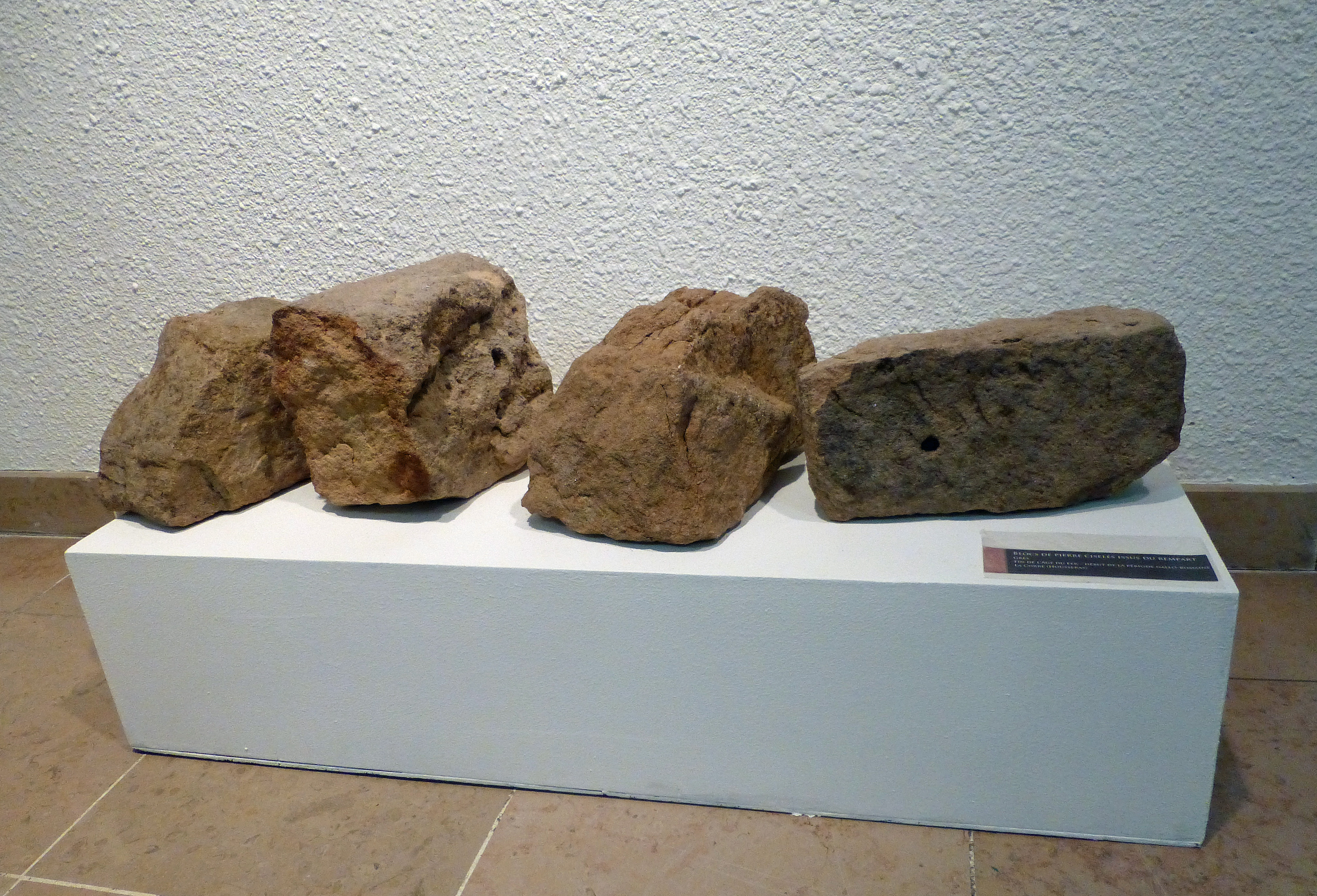 Blocs de pierre ciselés issus du rempart. Grès. Fin de l'âge de fer, début de la période gallo-romaine. En provenance du site de hauteur de la Corre (Housseras, Vosges). Musée Pierre-Noël de Saint-Dié-des-Vosges